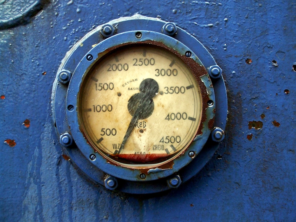 pormenor do indicador do nível de combustível. Local: Barreiro-A [Linha do Alentejo, PK 1] Data e hora: 13 de Dezembro de 2008 [12h40] Material: Locomotiva 1801 [English Electric] N.º UIC: 9094 120 1801-4